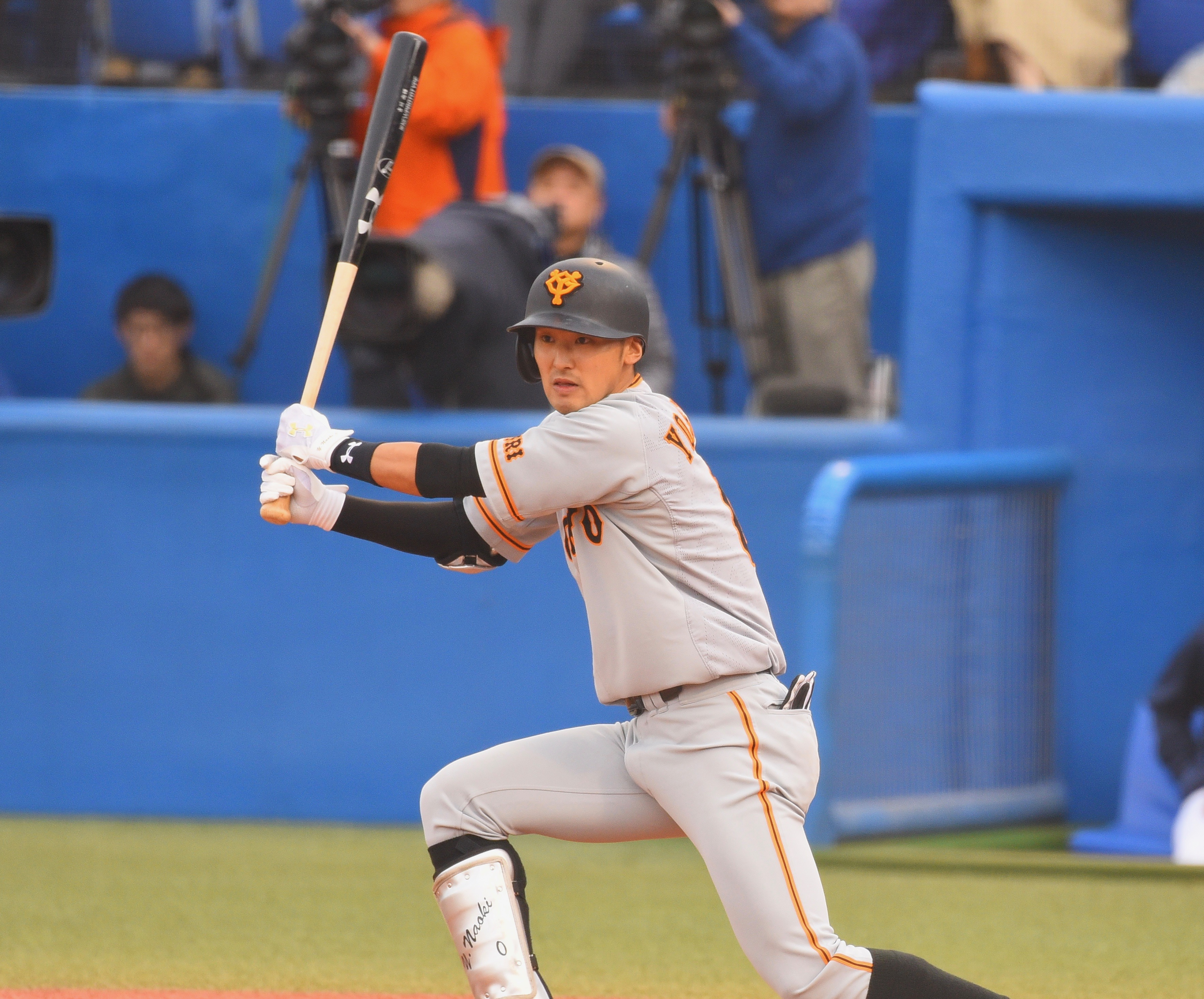 読売巨人軍 吉川尚輝 2018年４月７日 神宮球場